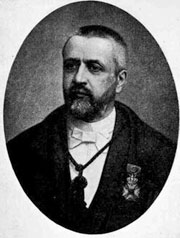 Stich aus: Jules Carlier: "Victor D'Hondt, Albert Nyssens—Notice et portrait."